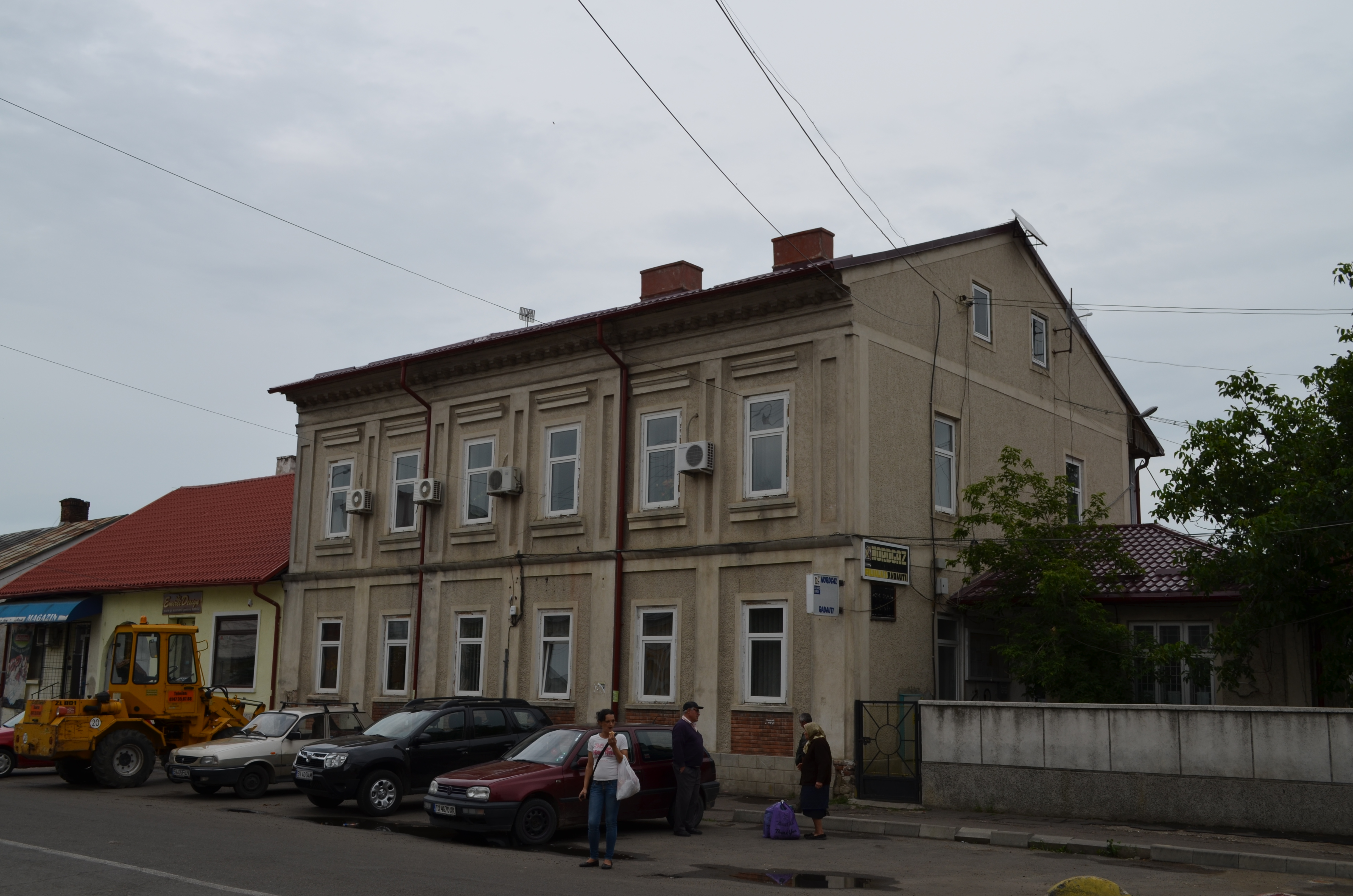 Fostul Spital Militar, astăzi sediul SC Servicii Comunale și Nord Gaz Rădăuți, Str. 1 Mai, nr. 4-6, Rădăuți